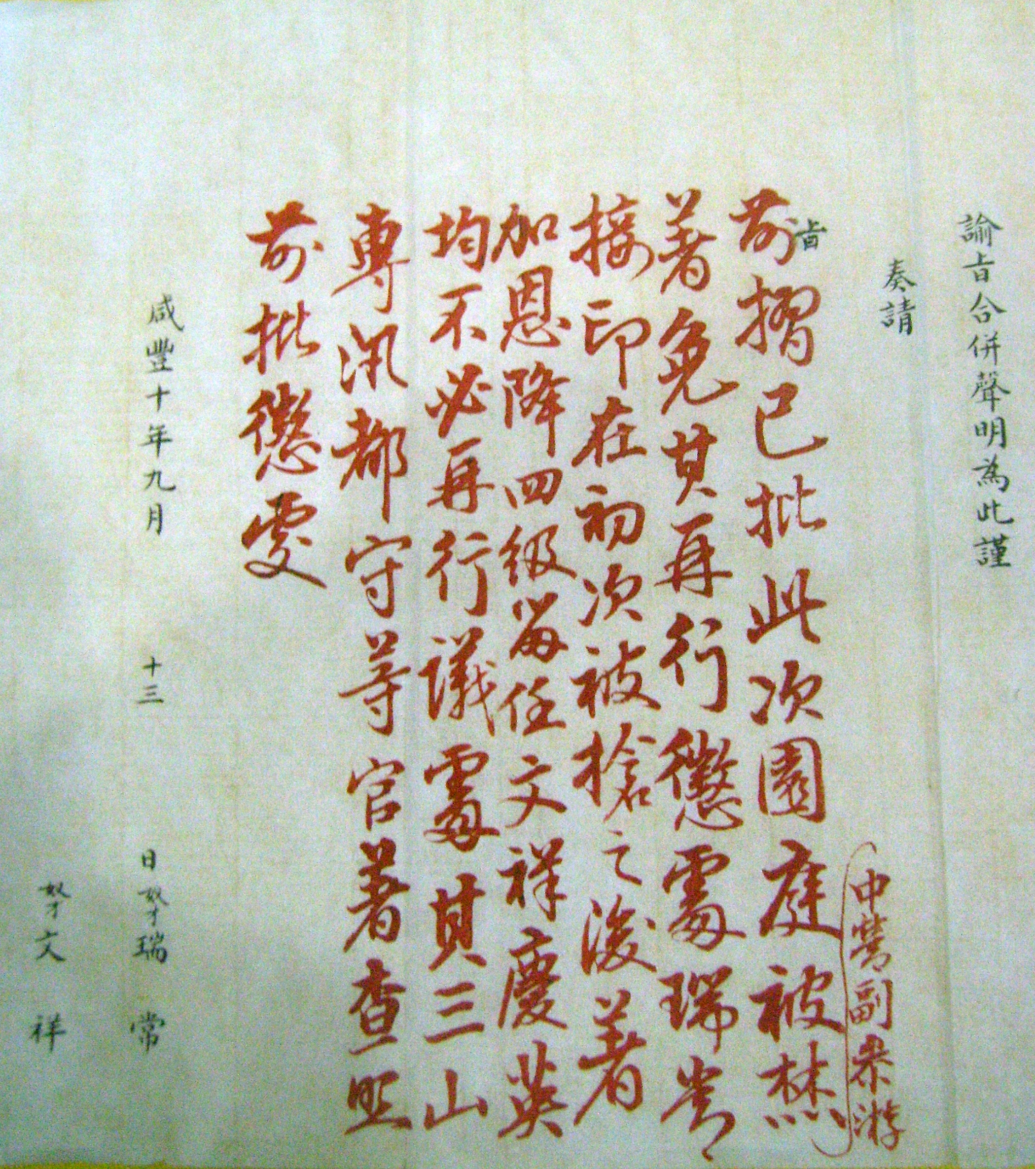 咸丰皇帝在圆明园被烧后的御批，现藏于圆明园